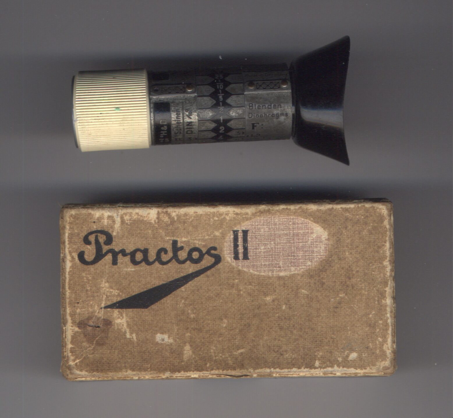 Belichtungsmesser Practos II von Hans Tönnies (Hamburg), ein optischer Belichtungsmesser Durchsichtsskala, Empfindlichkeit in DIN und "Scheiner"-Graden, sowie in °H & D, Blenden von 1,2 bis 50, Belichtungszeiten von 4 Minuten bis 1/400 Sekunde und "Cine" (ca. 1/35 Sekunden)